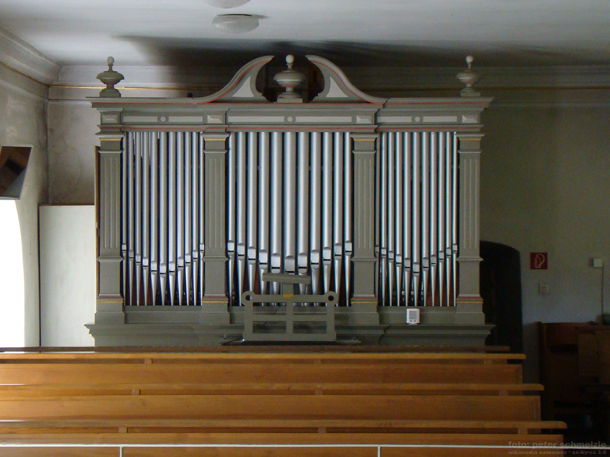 Evangelische Kirche Neidenstein, Westempore, Orgelprospekt